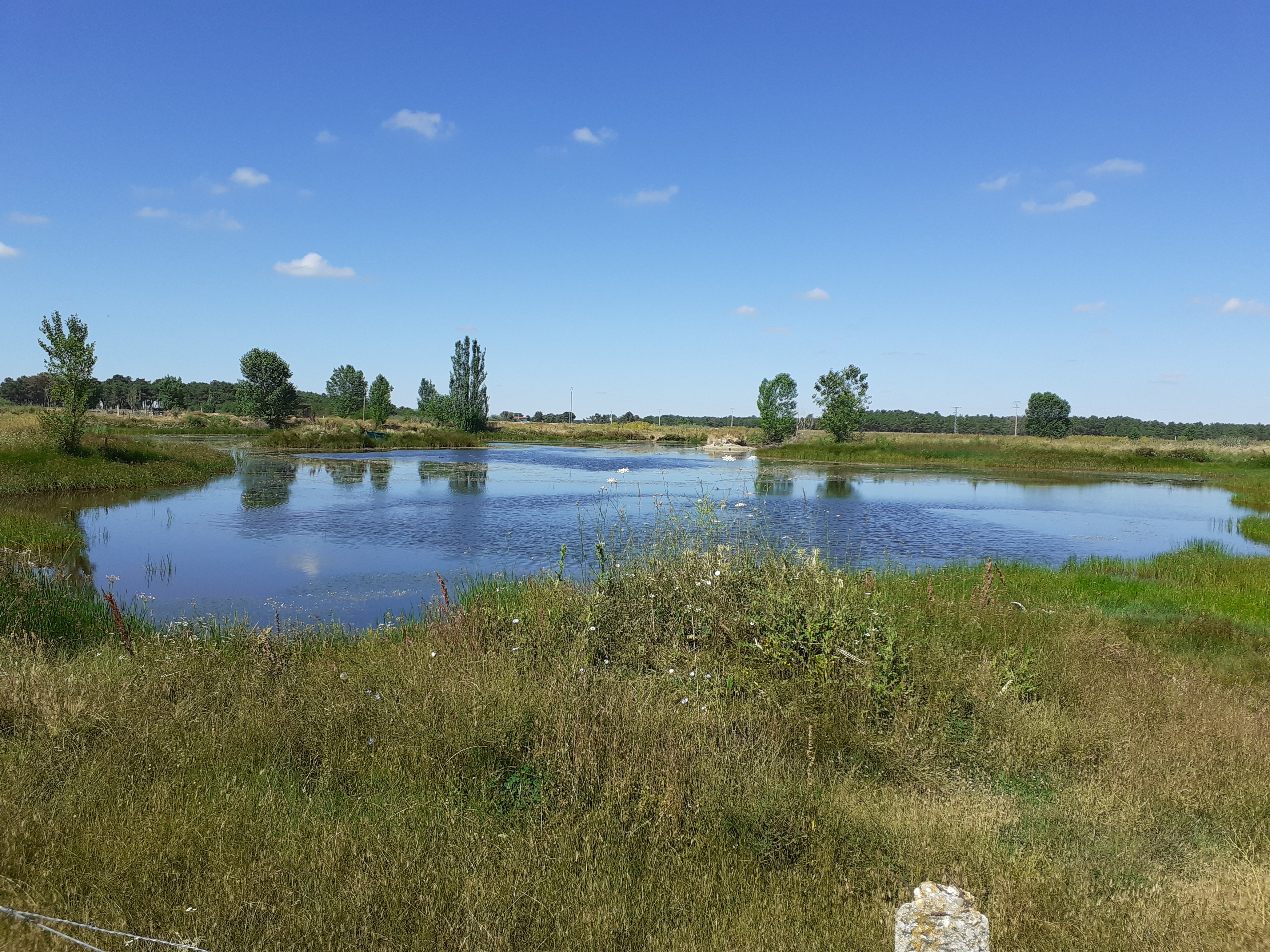 Estas lagunas atraen mucha fauna acuática.